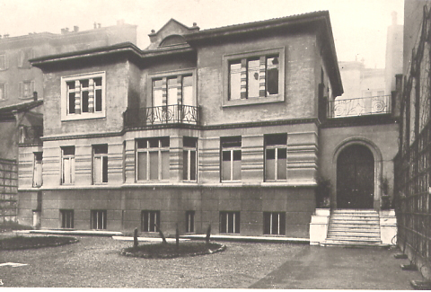 Per gentile concessione della Fondazione G. Sanvenero Rosselli